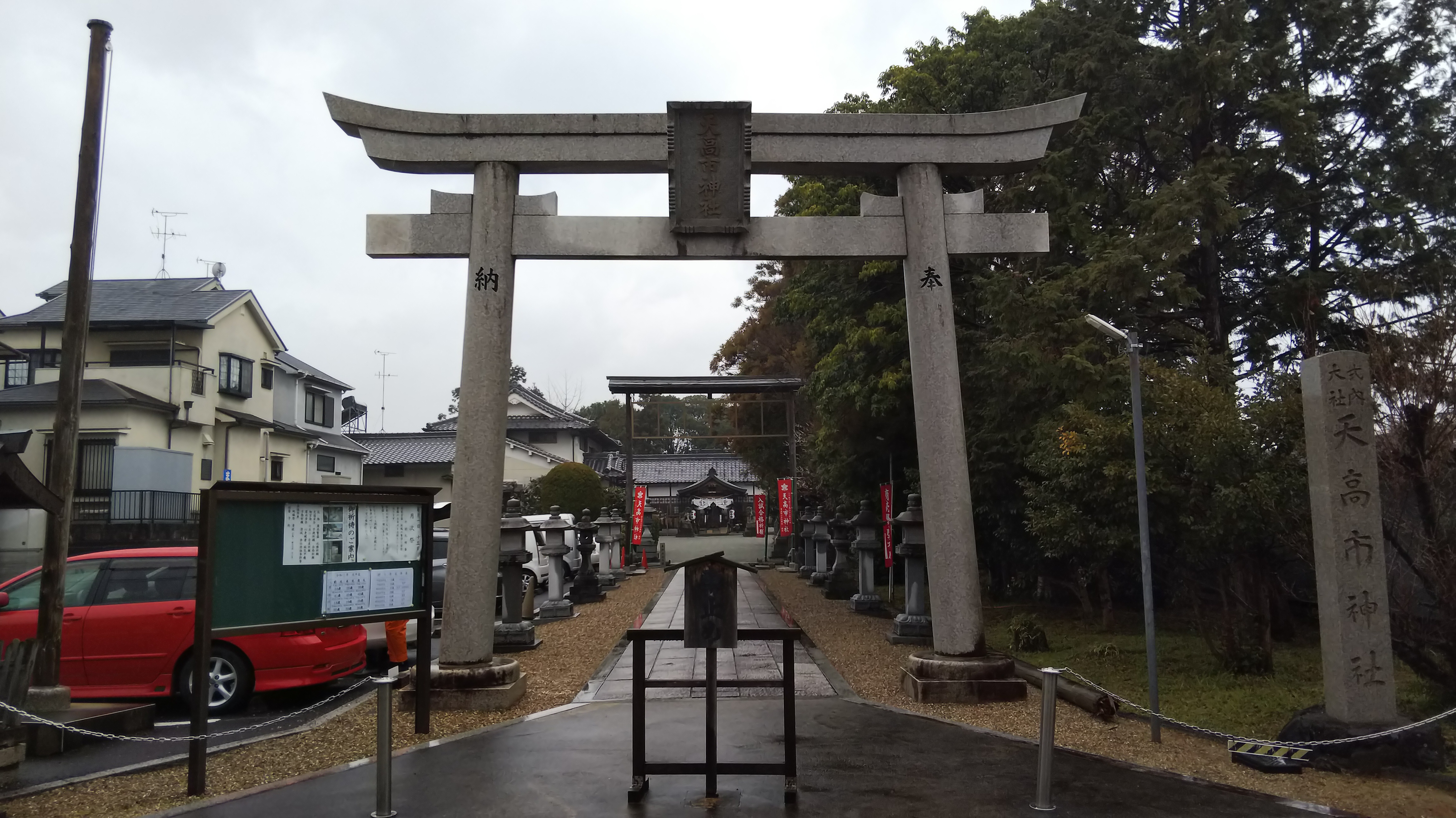 天高市神社鳥居